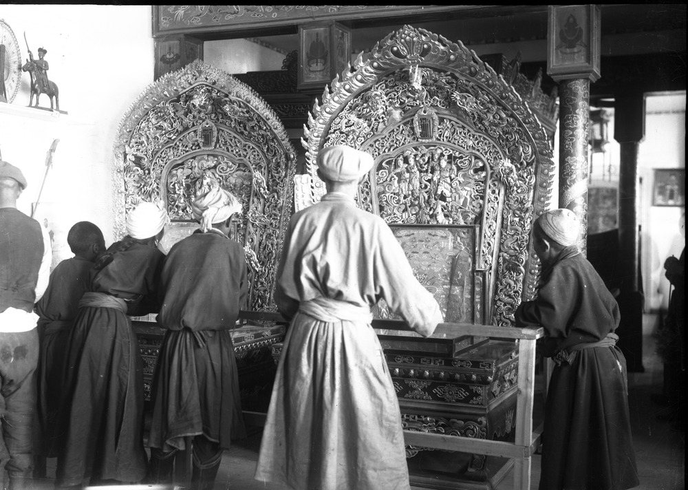 Монгол: Богд хааны ордон музей. 1926 он.